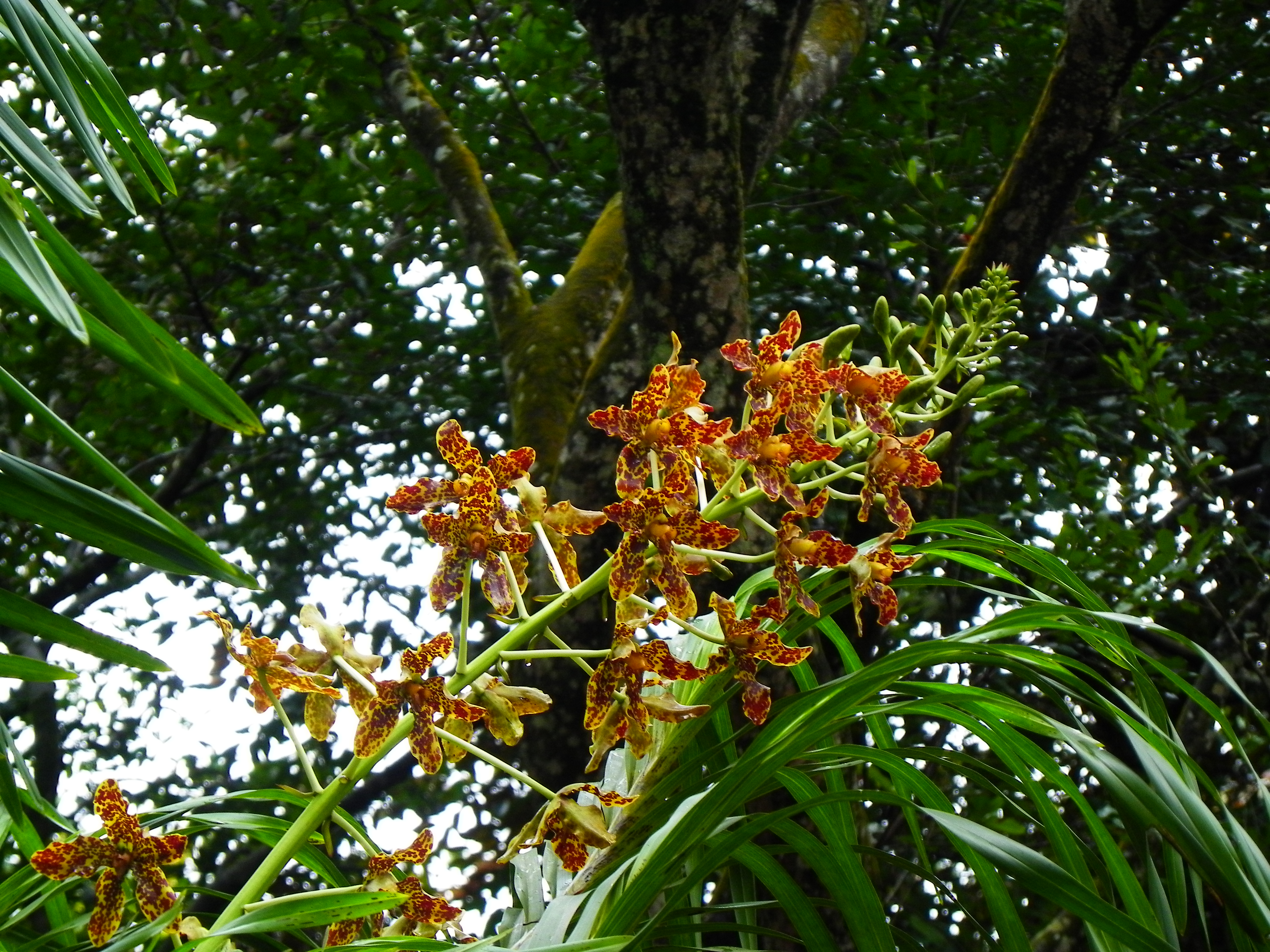 新加坡植物園國立蘭花花園前綻開的老虎蘭。